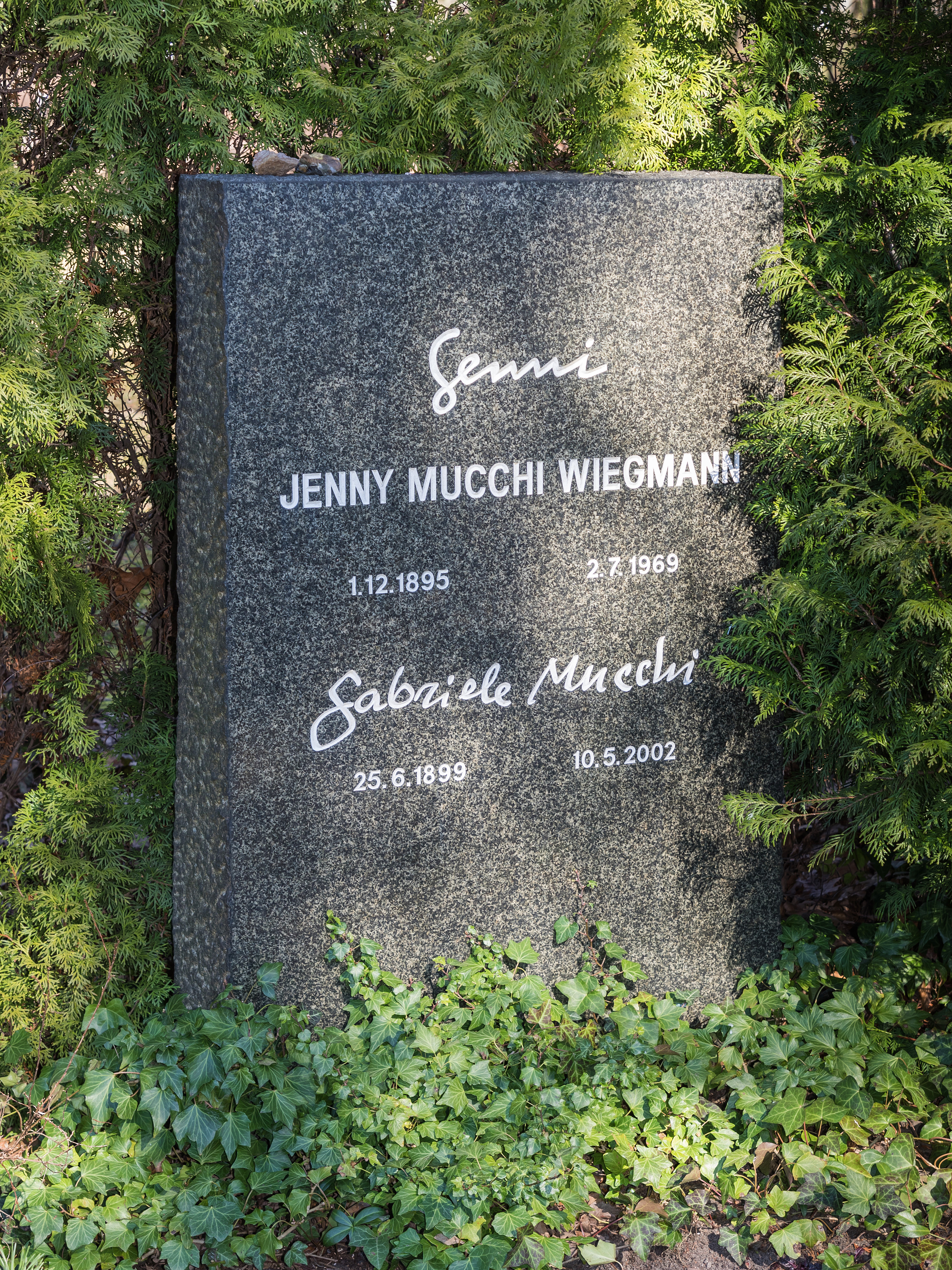 Zentralfriedhof Friedrichsfelde, Berlin-Lichtenberg. Abschnitt Künstler/Schriftsteller, Grab von Jenny Mucchi-Wiegmann / Gabriele Mucchi.